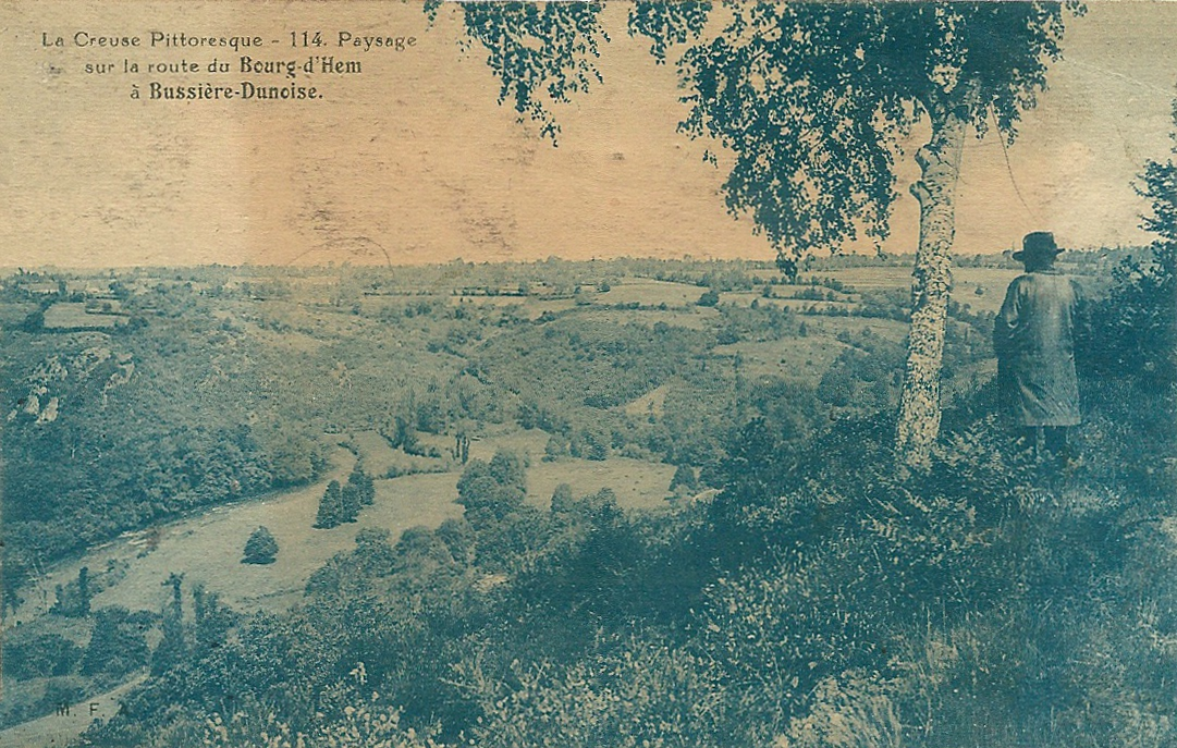 Paysage sur la route du Bourg d'Hem à Bussière-Dunoise (Creuse) - vers 1920